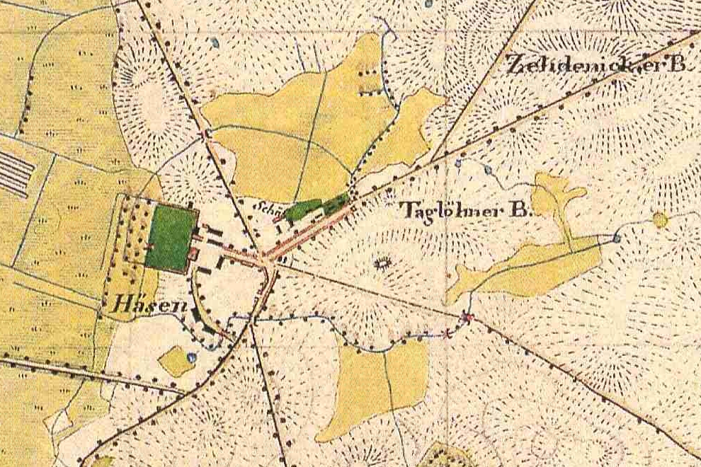 Karte von Häsen, Kreis Ruppin, Provinz Brandenburg, 1825